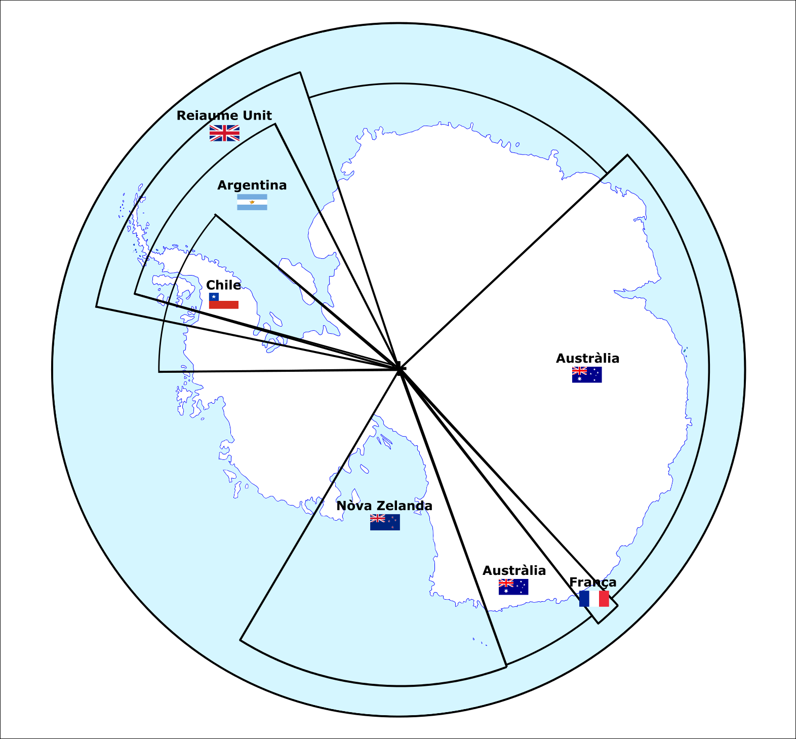 Revendicacions territòrialas sus lo continent austrau.